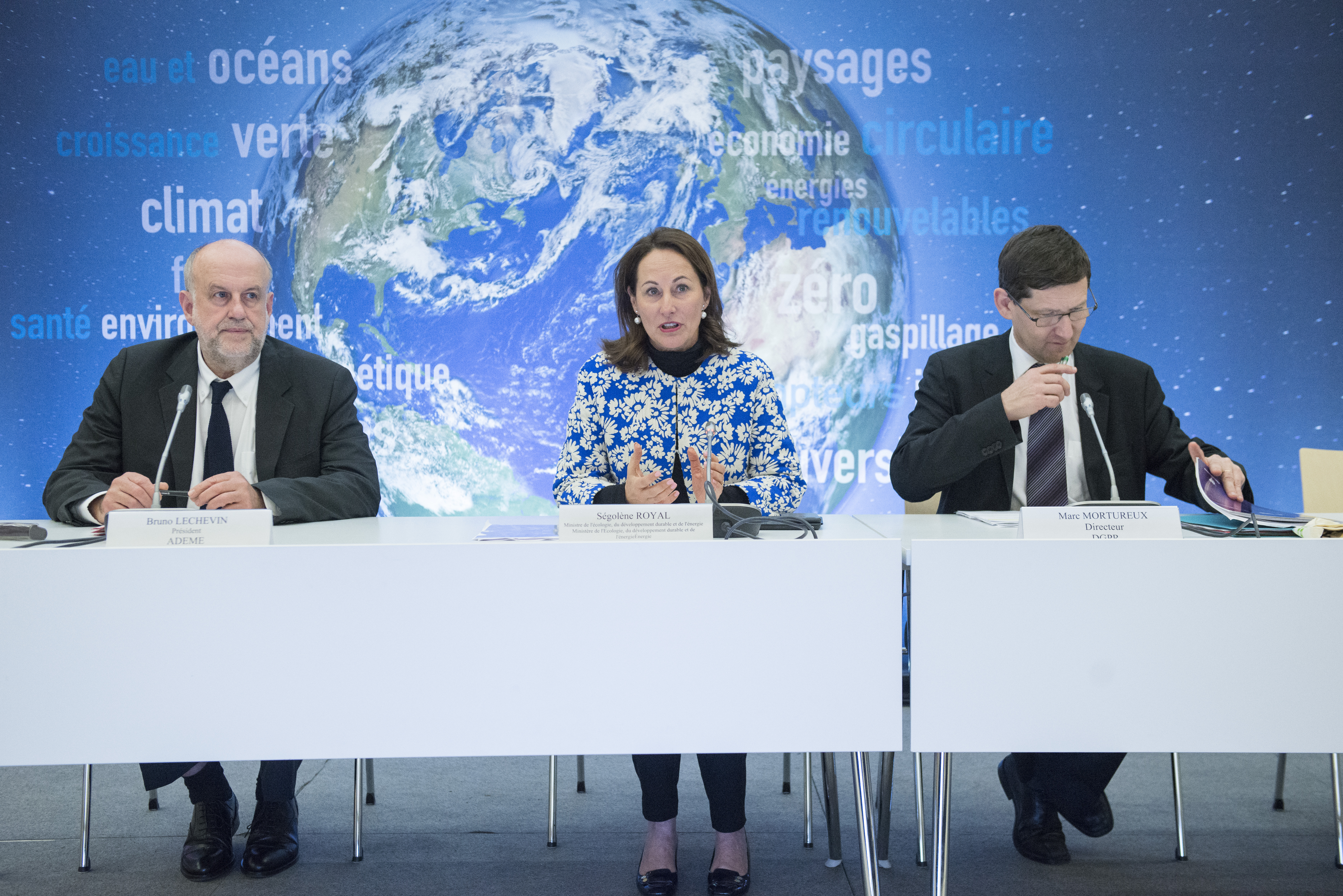 Bruno Léchevin, Ségolène Royal et Marc Mortureux lors de la réunion des 150 Territoires "zéro déchet zéro gaspillage". Hôtel de Roquelaure Paris